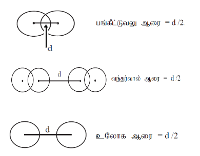 மூலகங்களின் அணு ஆரையை அளக்கும் பல்வேறு முறைகள்